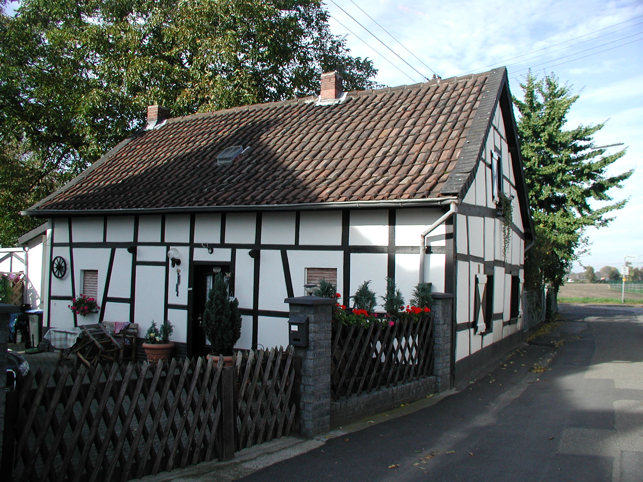 Denkmalgeschütztes Fachwerkhaus, Dorfstraße 35, Hürth-Sielsdorf